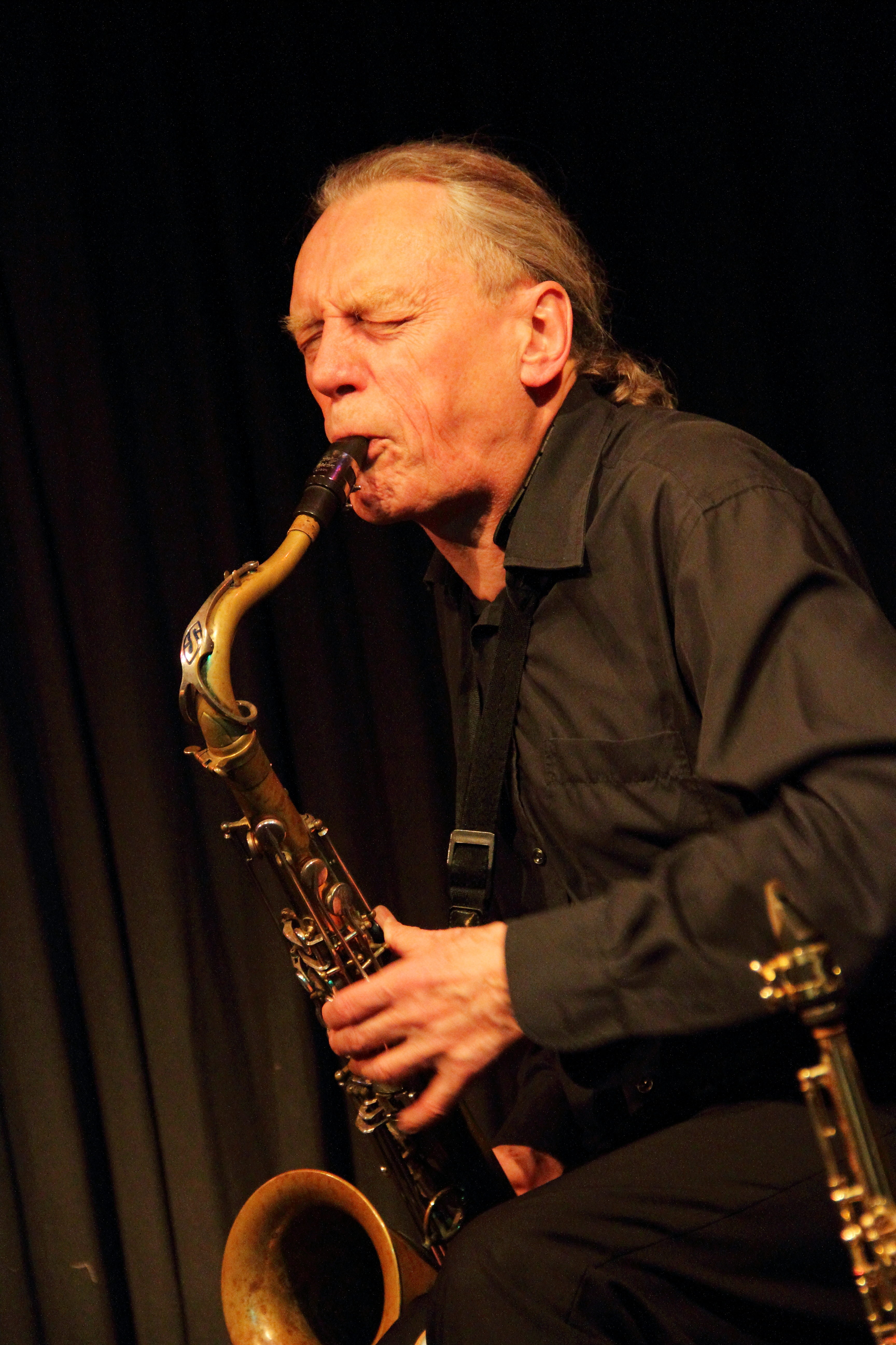 Urs Leimgruber mit Duo Pancake im Club W71, Weikersheim.